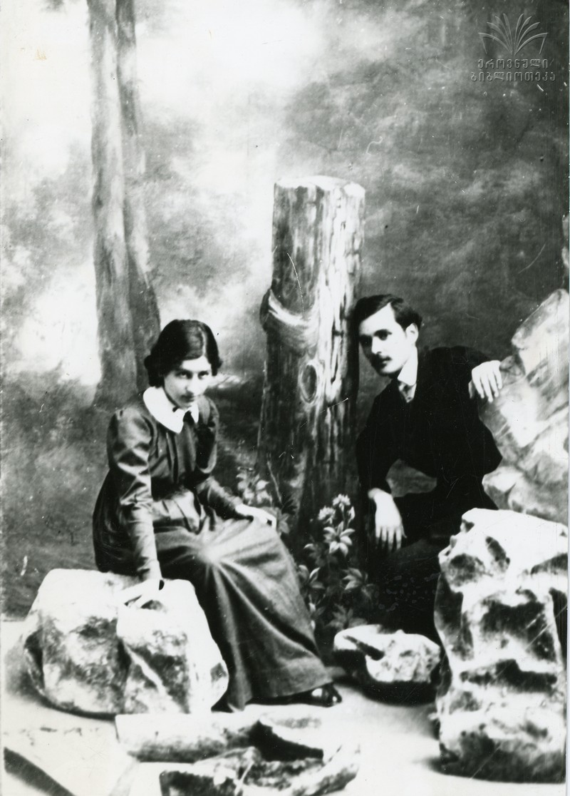 გალაკტიონი და ოლია ოკუჯავა